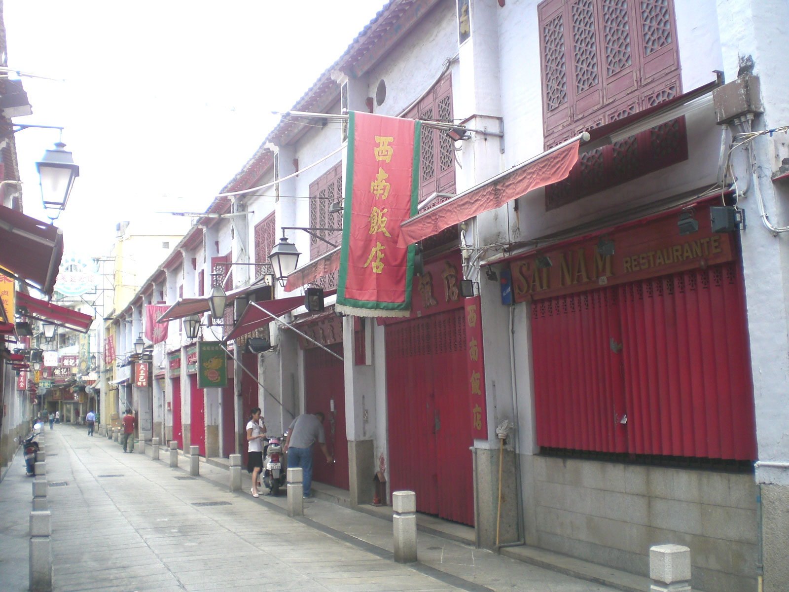 福隆新街，(Rua da Felicidade)